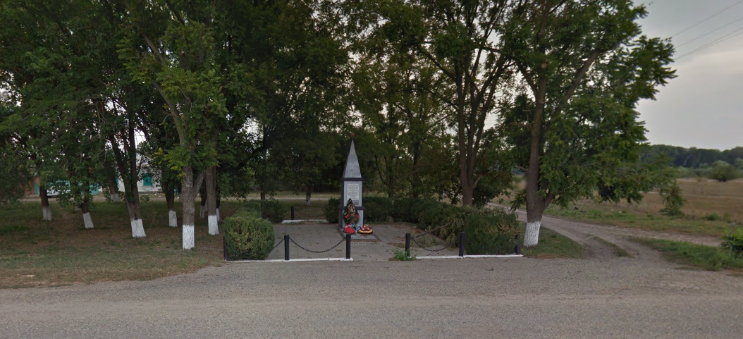 Памятник погибшим красноармейцам. Новомихайловское